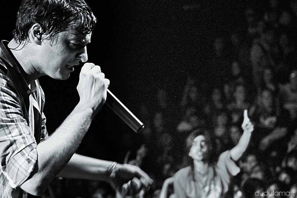 Joaquin